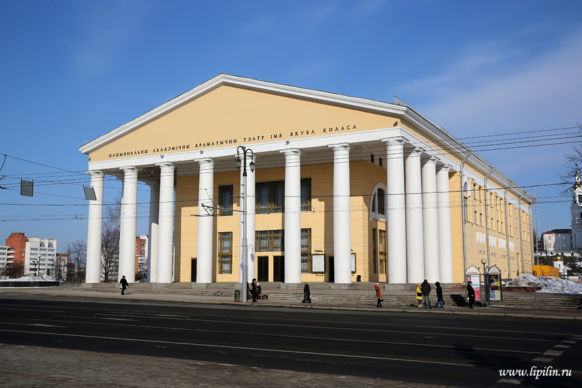 Віцебск.